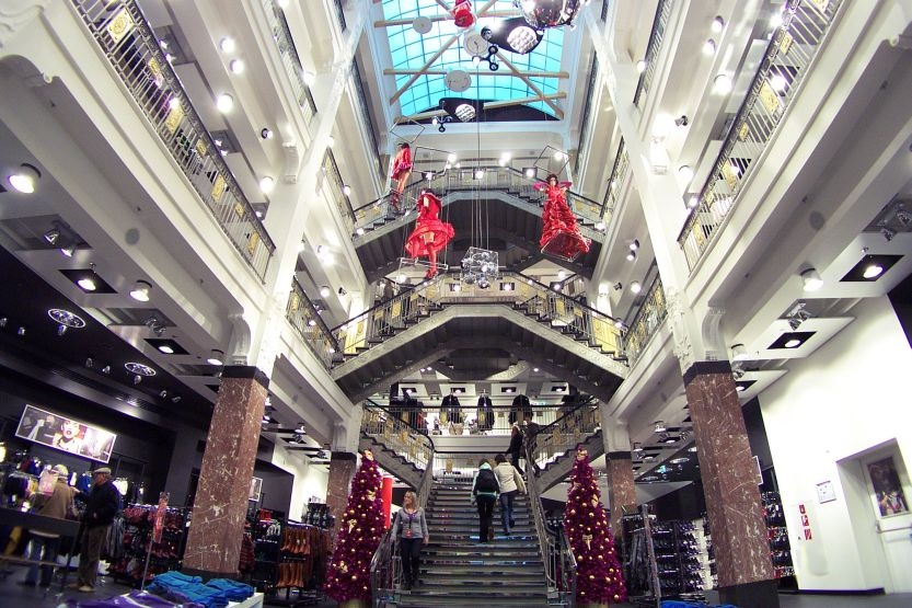 Jugendstil-Kaufhaus von 1908 in Halle (Saale), ehemaliges Konfektionshaus Weiss, heute New Yorker, Leipziger Straße 105 / Ecke Marktplatz